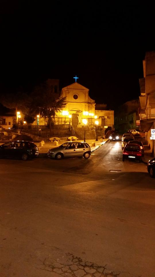 Piazza Madrice e la Chiesa Maria SS. del Carmelo